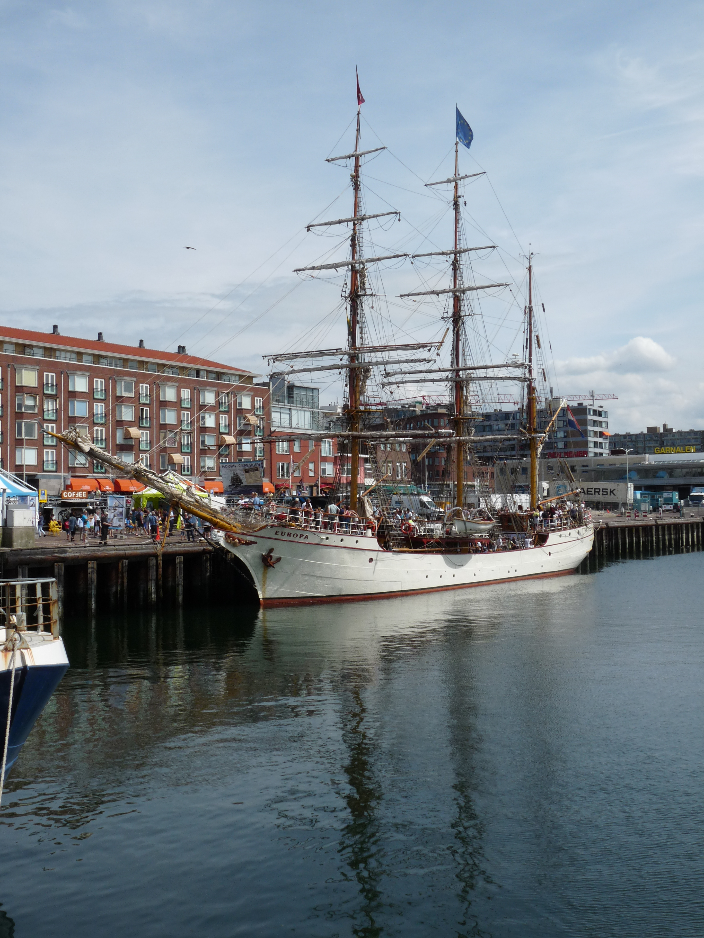 Het schip Europa geeft een bezoek aan Scheveningen en houdt een open deur dag.